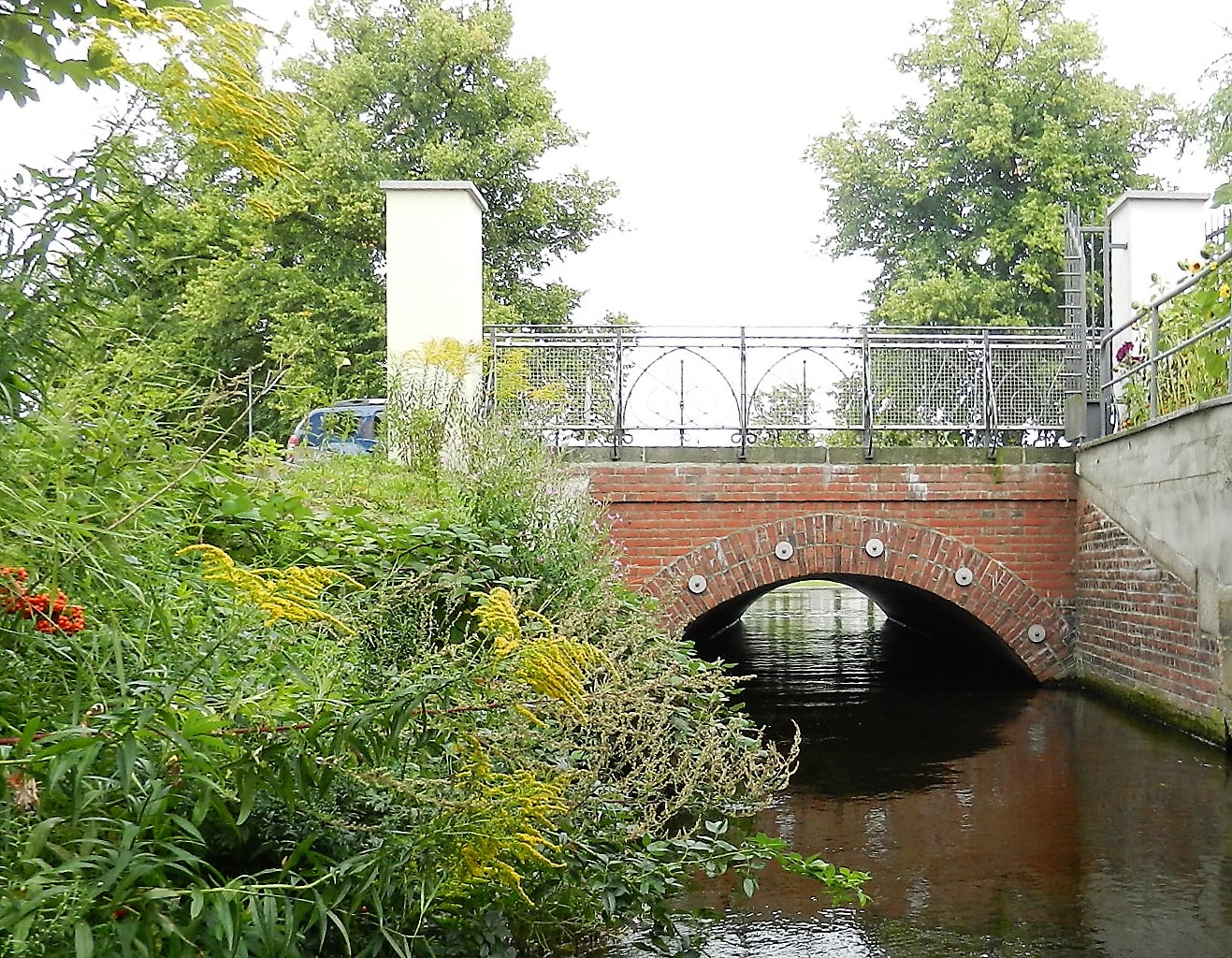 Alexandrinenstraßenbrücke , Aubachdurchfluß in der Pfaffenteich